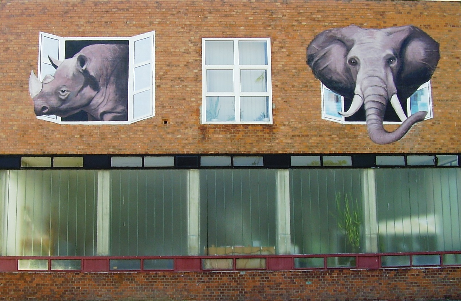 Elefánt és az orrszarvú (Fehérvári Tekla (tervező), Lengyel Valter, Karácsonyi László, és Grubánovits Attila (festők)) Barcika Szolg Kft. irodaháza Hőközpont épülete Kazincbarcikán (Liget út 2.)